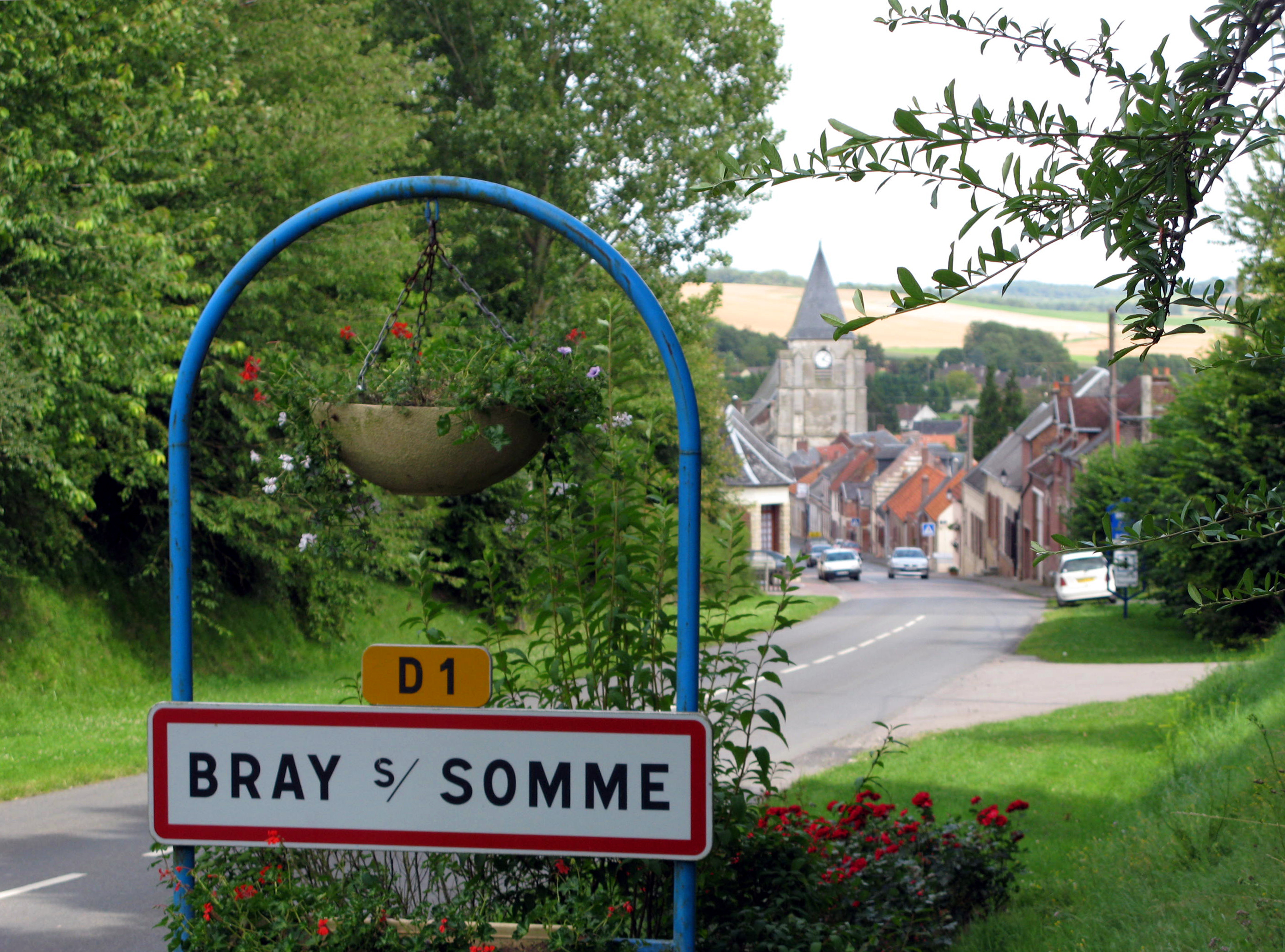 Bray-sur-Somme (Somme, France) - Entrée Ouest dans la petite ville, en venant de Corbie.